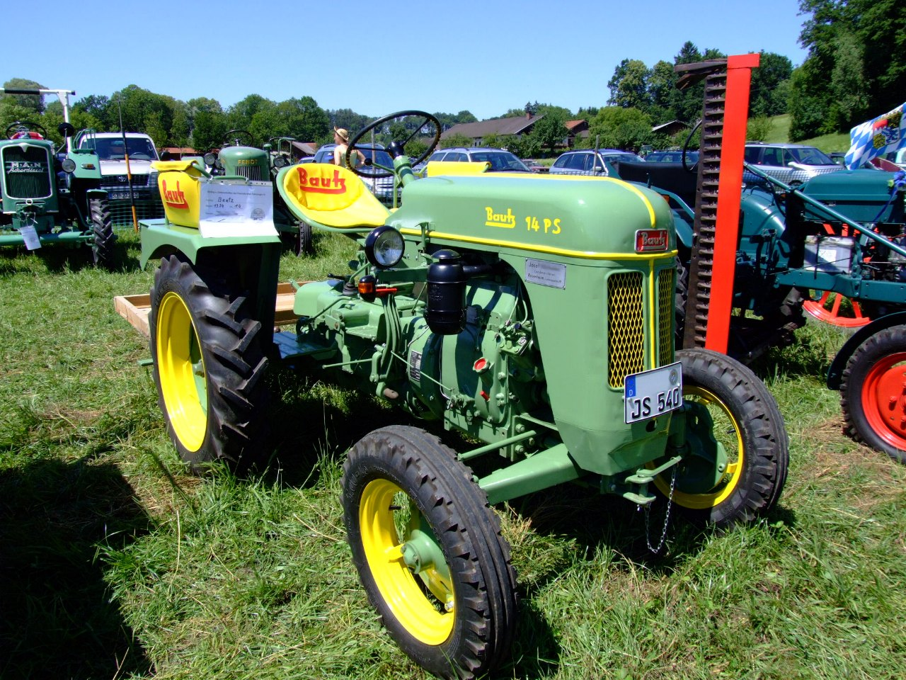 Bautz-Schlepper AS 120, 14 PS, Baujahr 1954, 1249 ccm Hubraum, 1085 kg Leergewicht